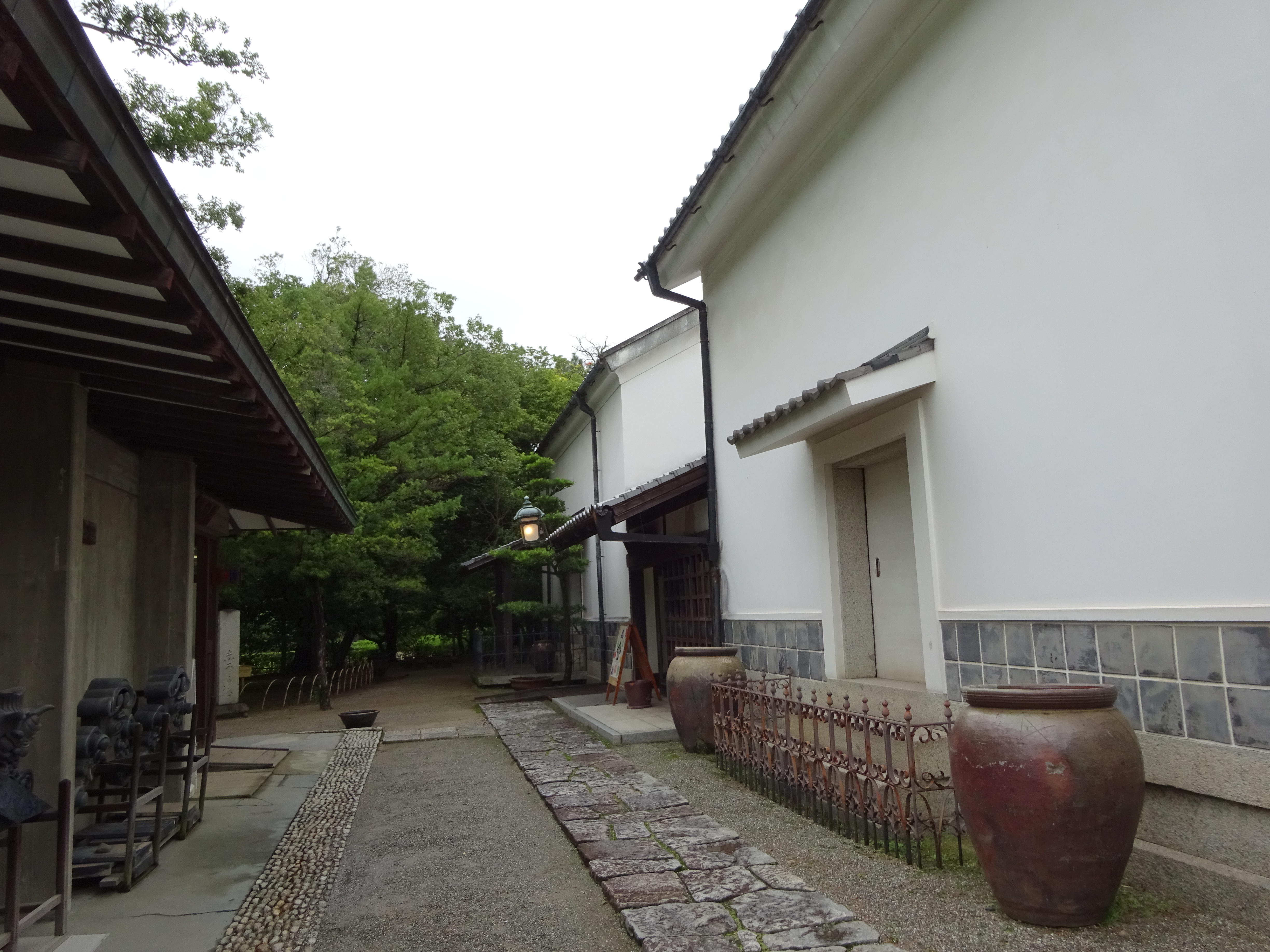 栗林公園の讃岐民芸館（四館構成）の古民芸館